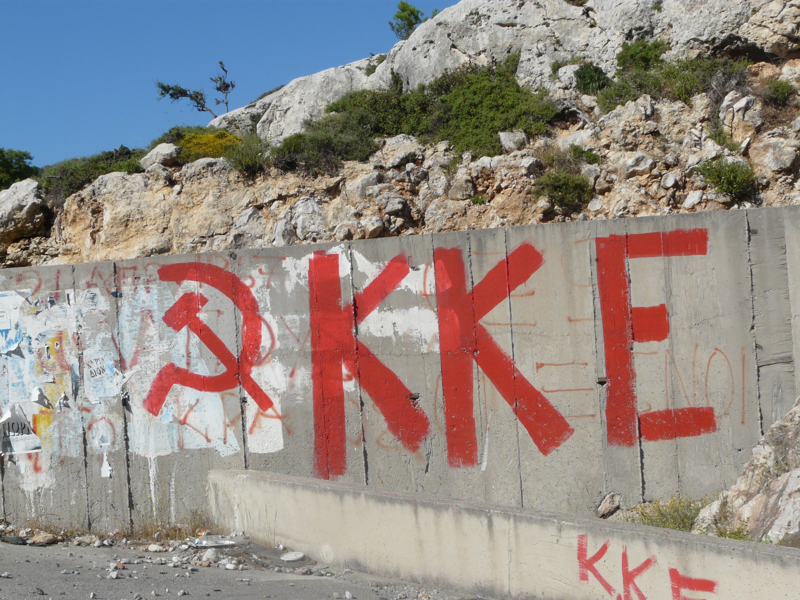 Rhodes